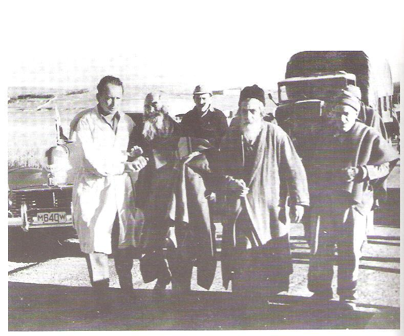 שחרור זקני הרובע היהודי משבי ירדן